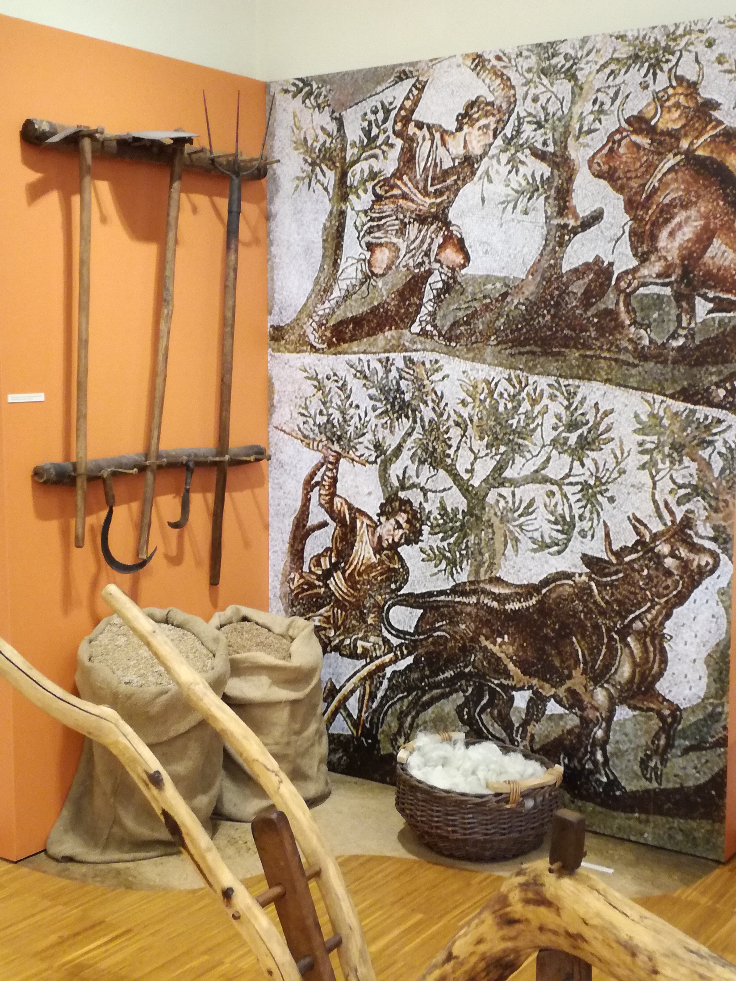 Attrezzi agricoli risalenti a varie epoche